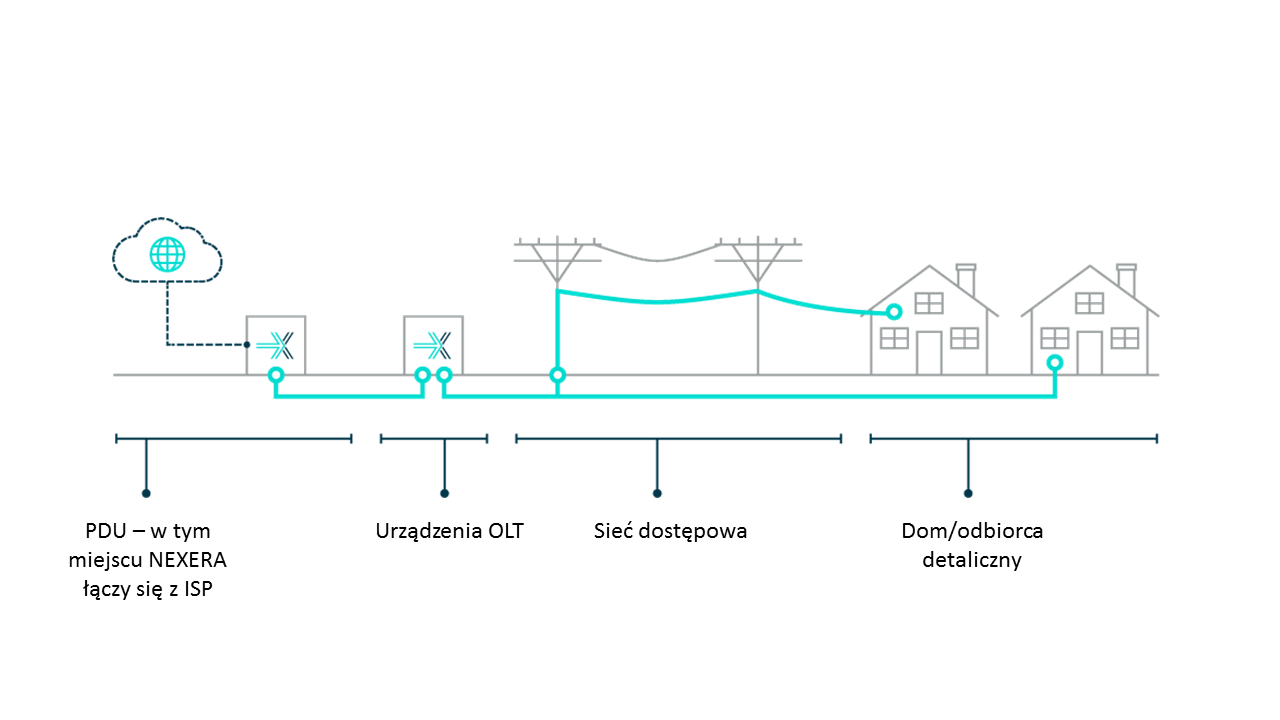 Schemat przedstawia sposób podłączenia sieci NEXERA